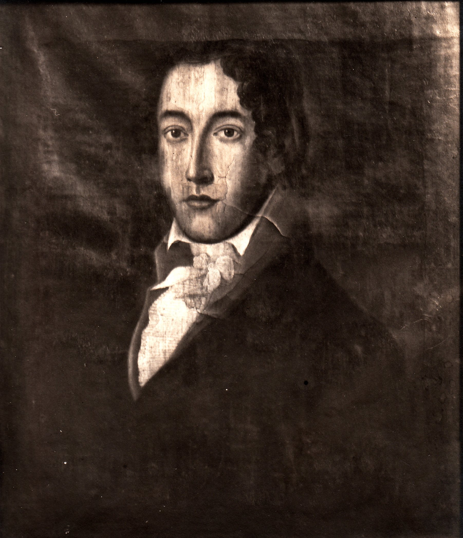 Format: Fotopositiv.